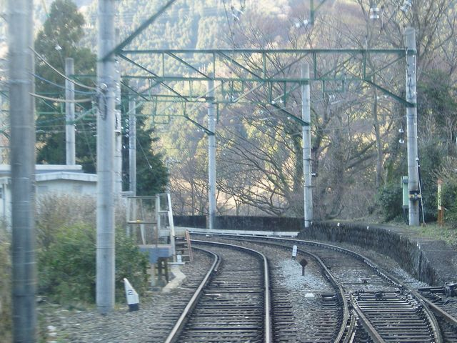 箱根登山鉄道 仙人台信号場 列車の中から撮影 2007.03.08 投稿者が撮影